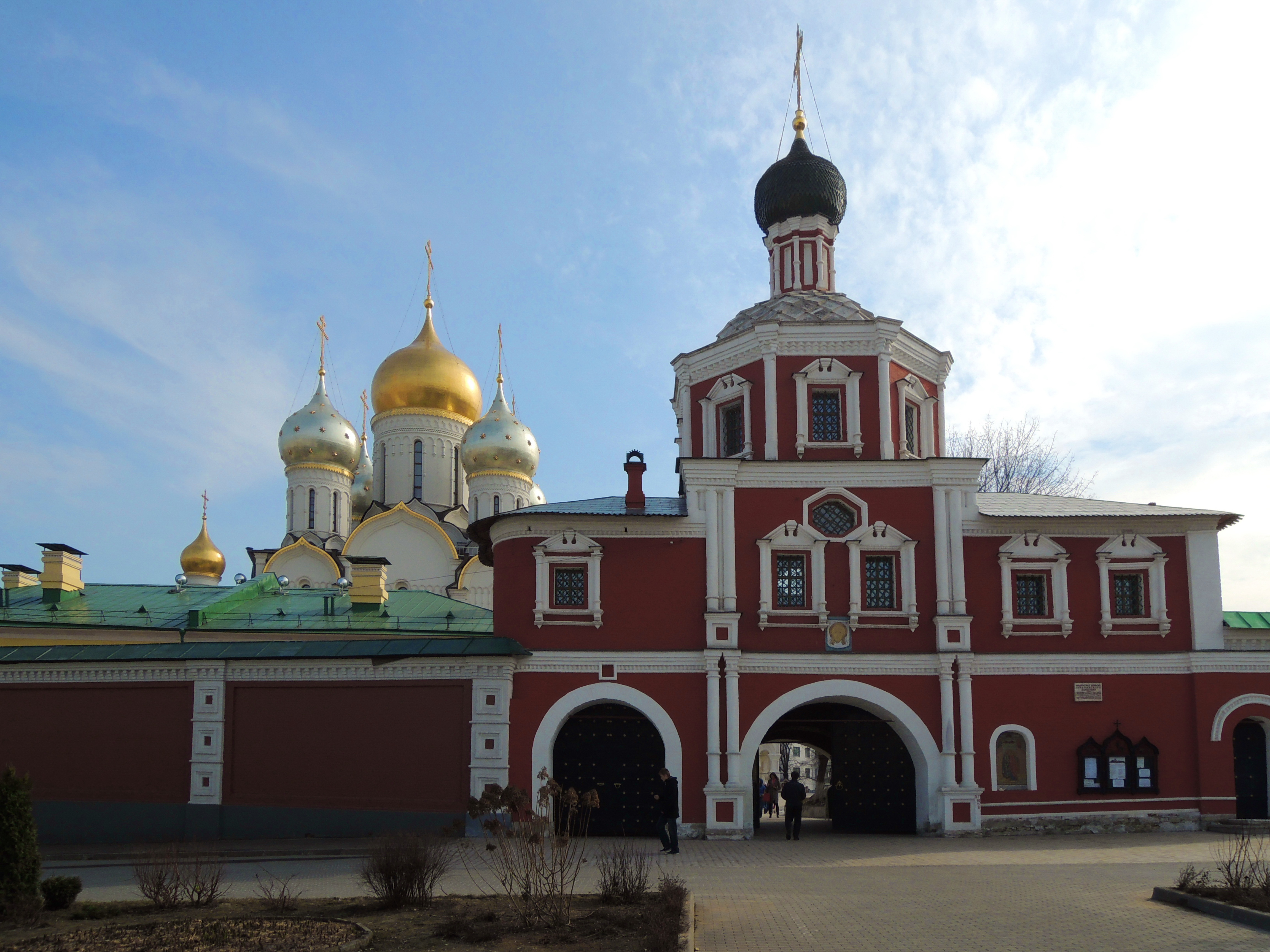 Зачатьевский монастырь